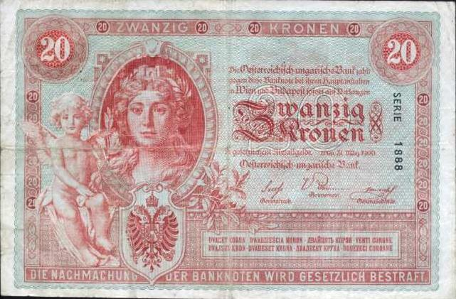 20 Austro-Hungarian Krone/korona (1900) - obverse